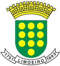 Brasão do município de Limoeiro, Pernambuco, Brasil